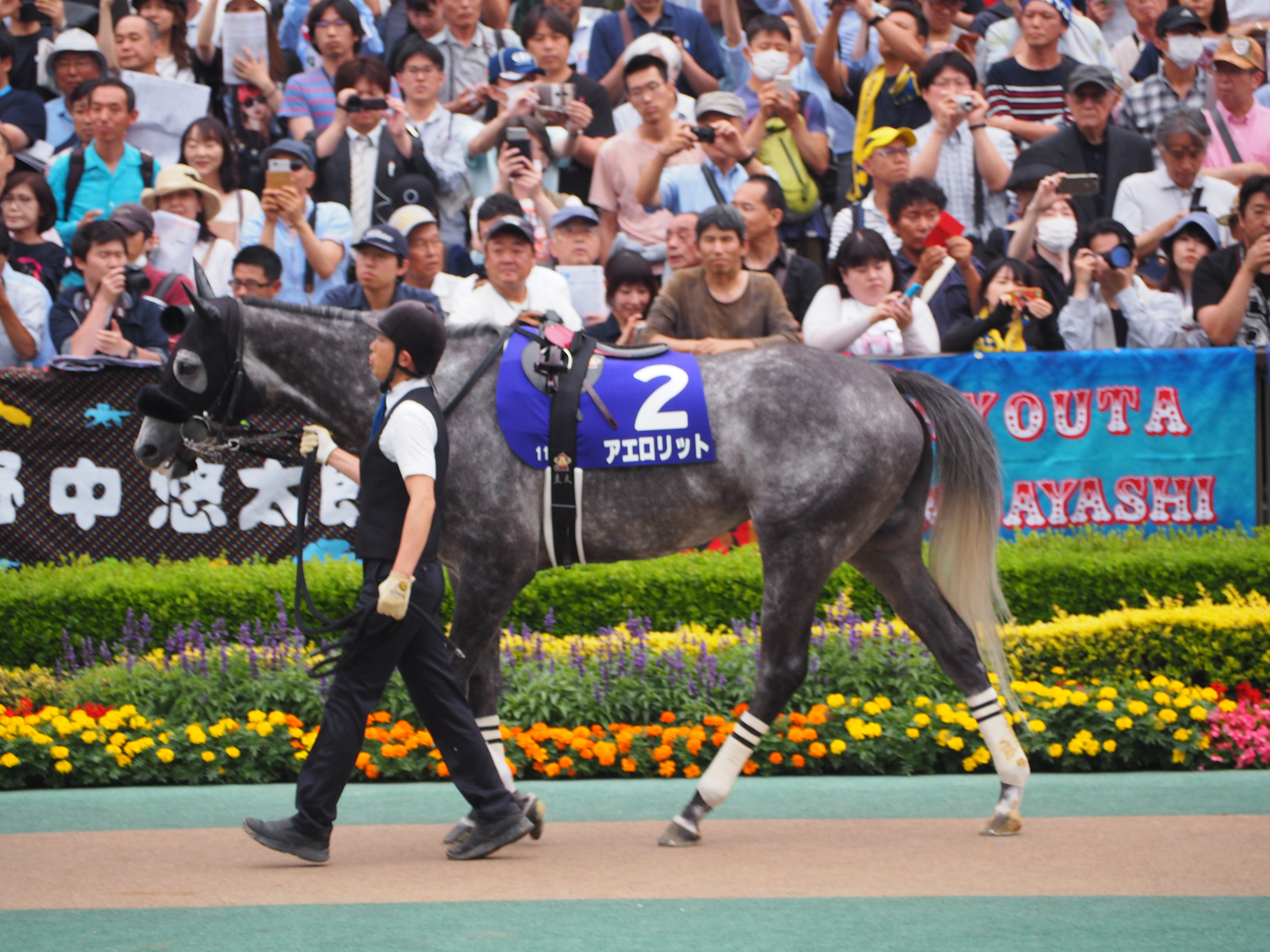 安田記念 パドック 2019